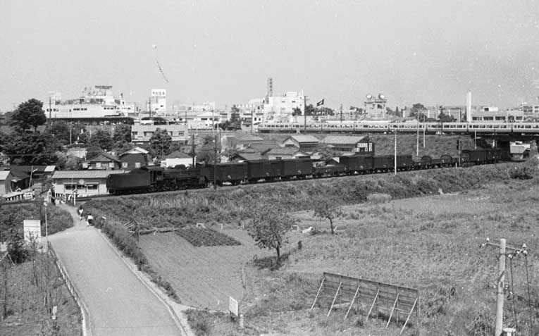 立体交差するC58牽引の横浜線貨物列車と小田急NSE。昭和40年1月1日撮影。